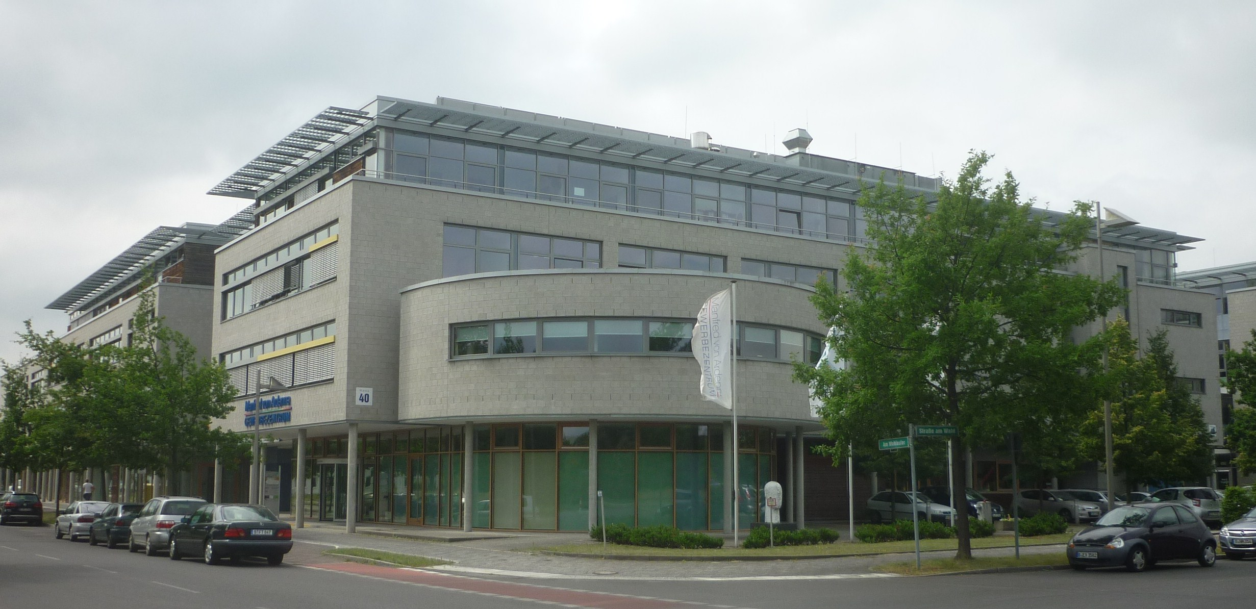 Manfred von Ardenne Gewerbezentrum im Innovationspark Wuhlheide (IPW) in Berlin-Köpenick